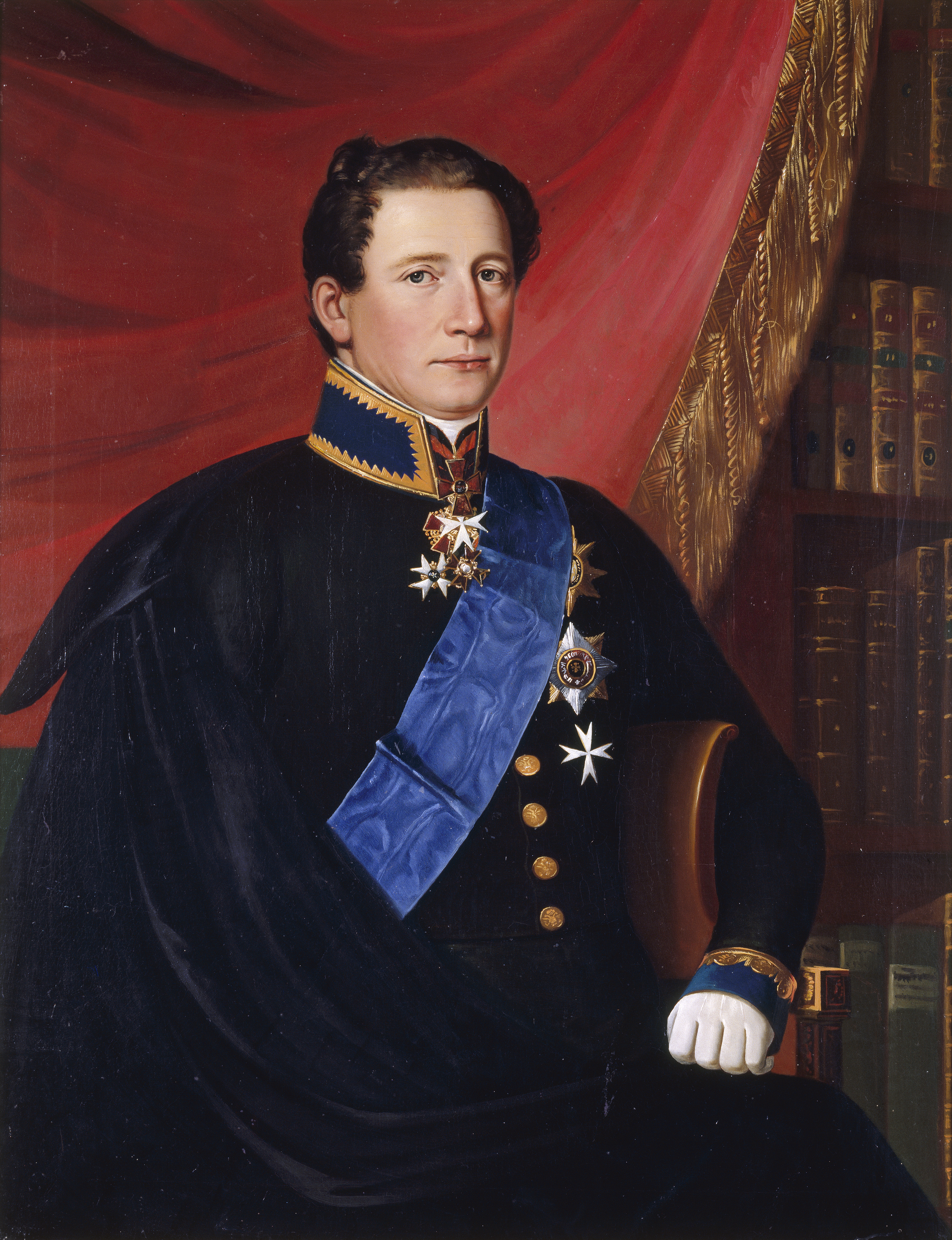 Finnish: Ministerivaltiosihteeri Alexander Armfelt (1794–1876).title QS:P1476,fi:"Ministerivaltiosihteeri Alexander Armfelt (1794–1876)." label QS:Lfi,"Ministerivaltiosihteeri Alexander Armfelt (1794–1876)."